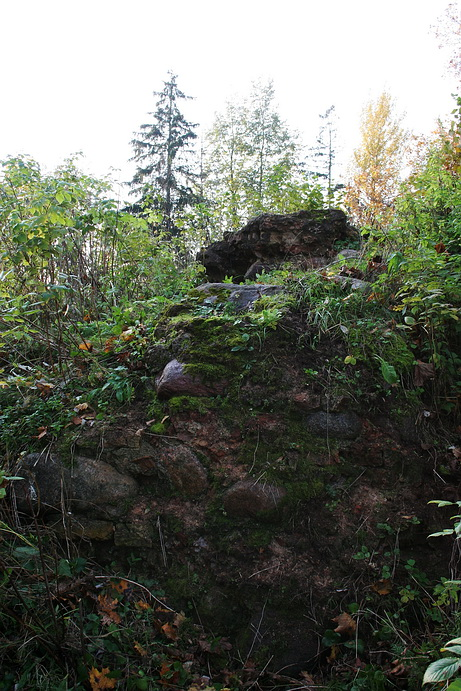 Rokantiškės Castle ruins in Vilnius